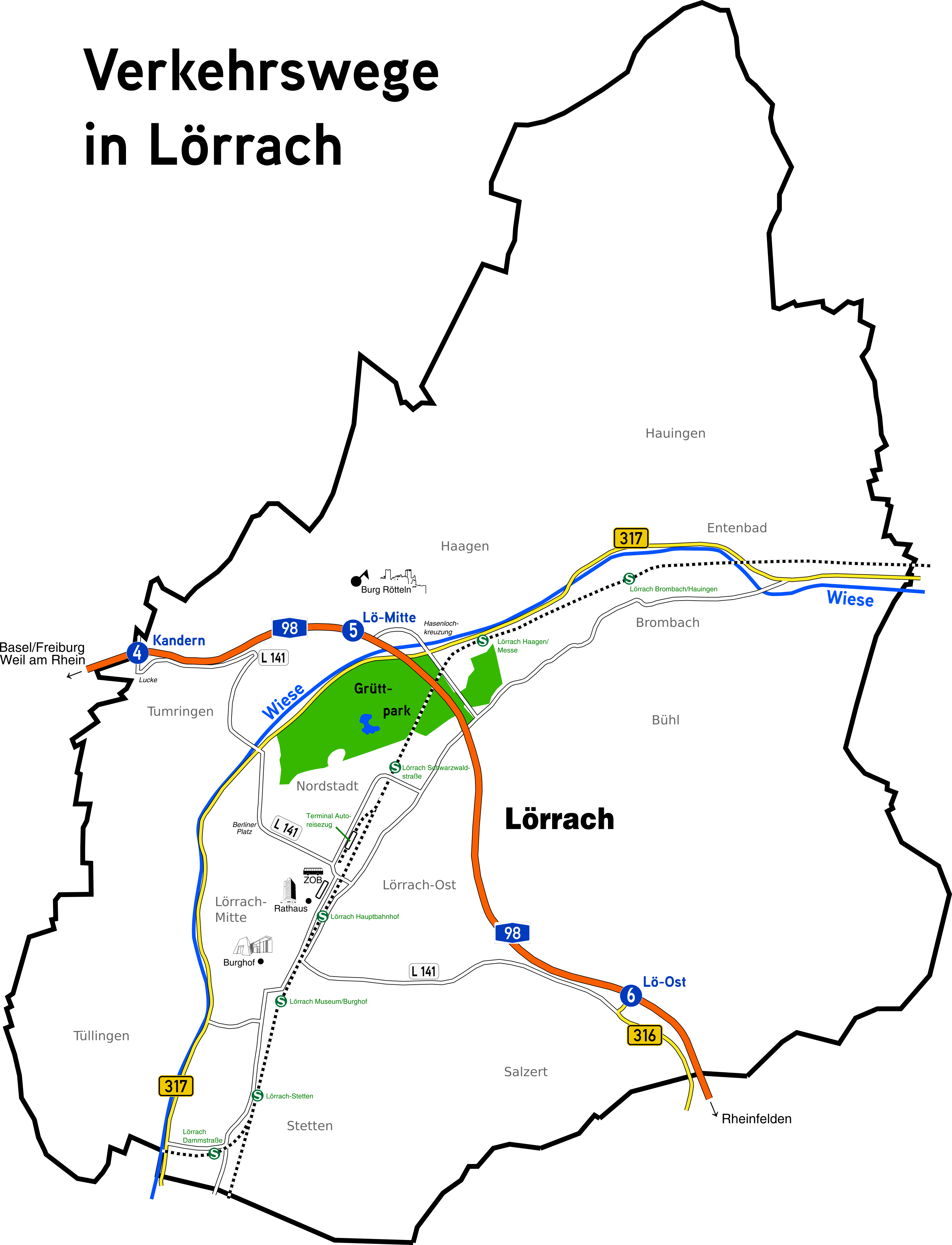 Karte: Verkehrswege in Lörrach